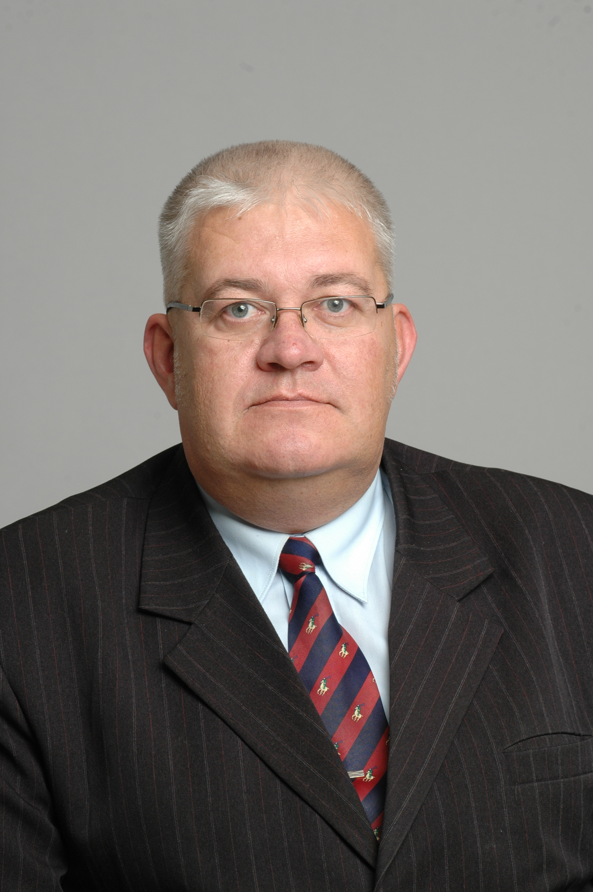 Foto: Saeima